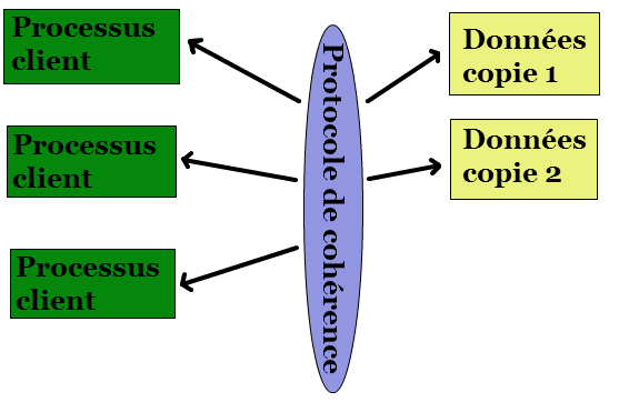 Protocole de coherence